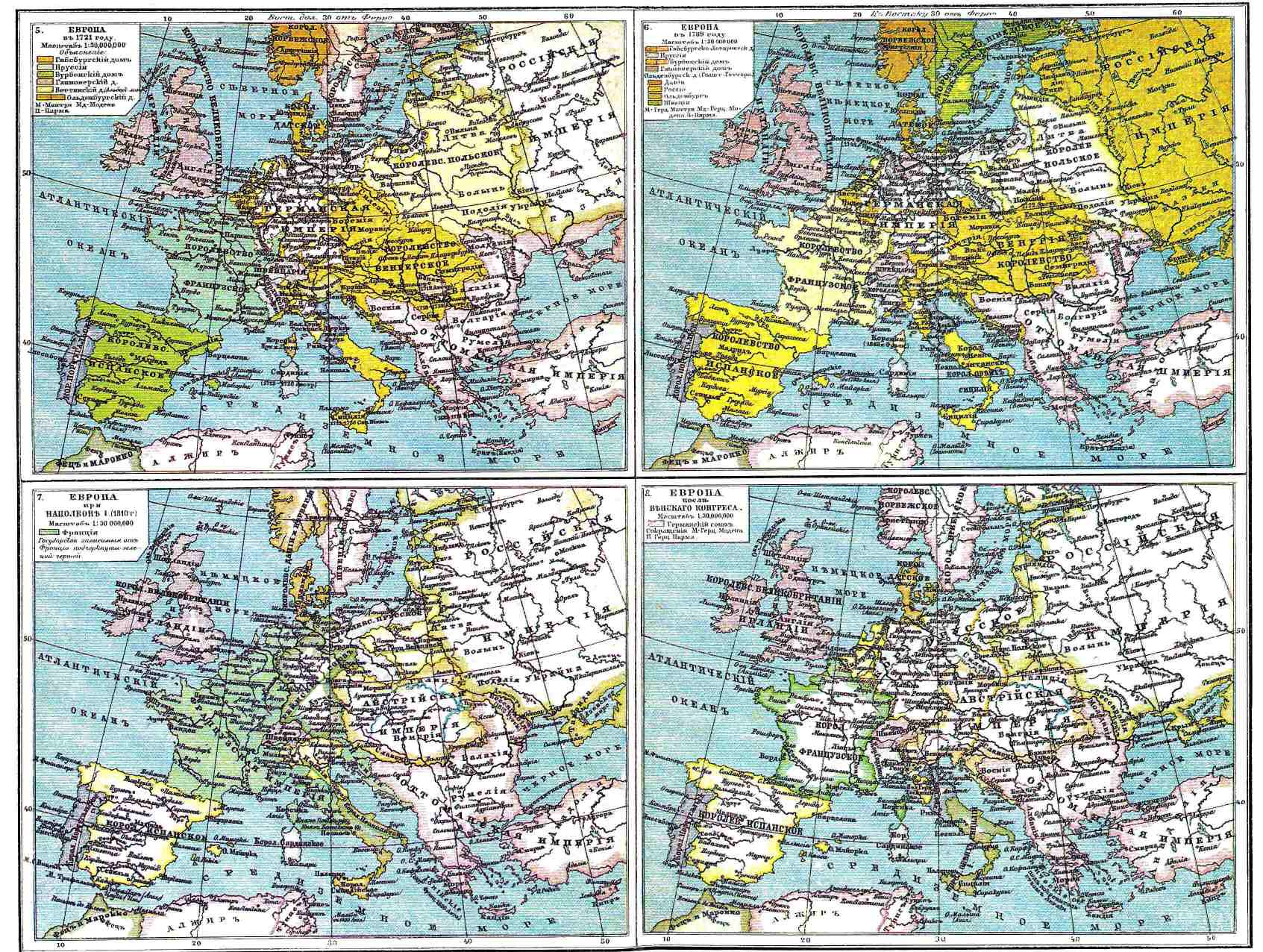 Европейские карты 18-19 веков. Карта Европы в 1721 году, в 1789, при Наполеоне и после Венского конгресса. Иллюстрация из энциклопедии Брокгауза и Ефрона